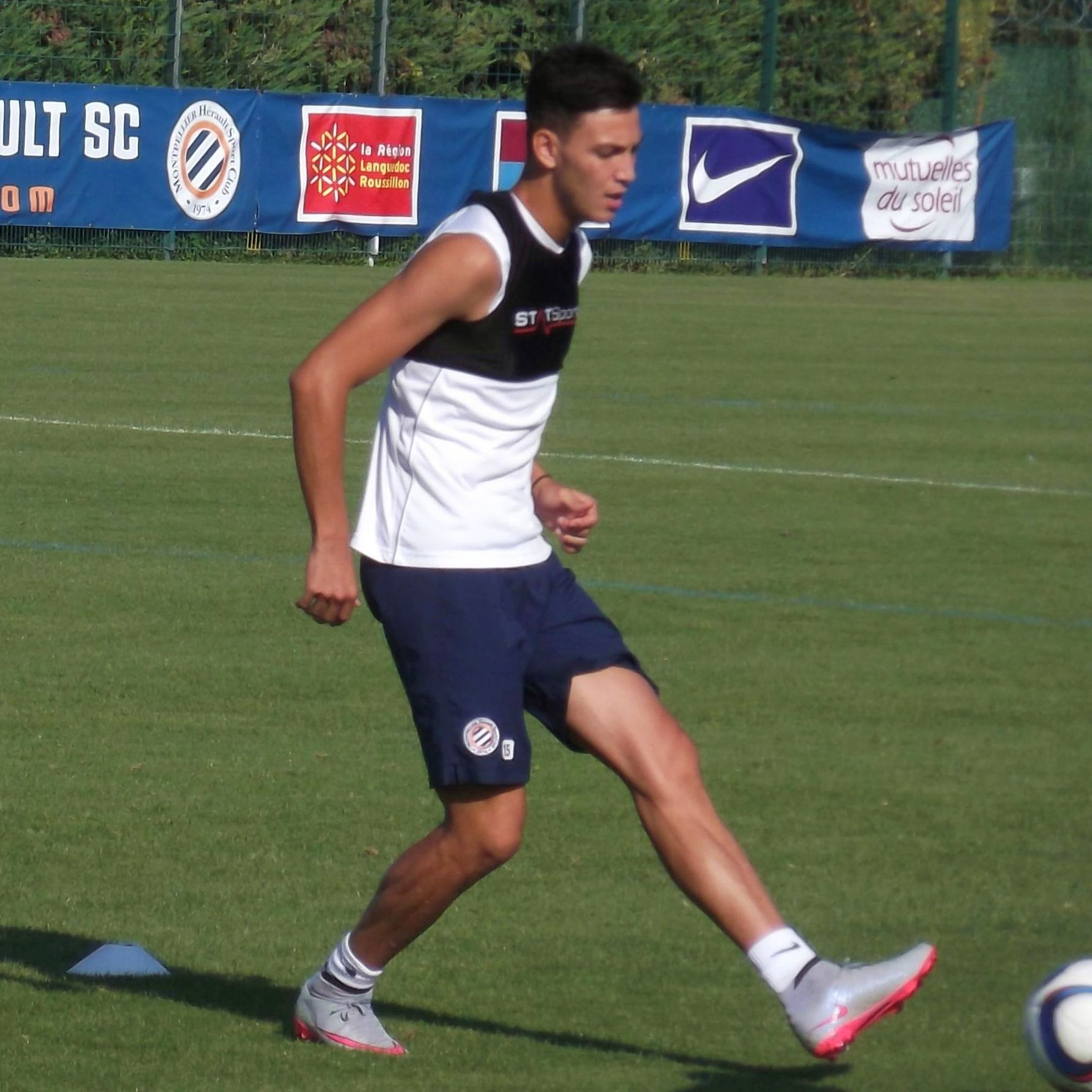 Ramy Bensebaini (Montpellier), août 2015.